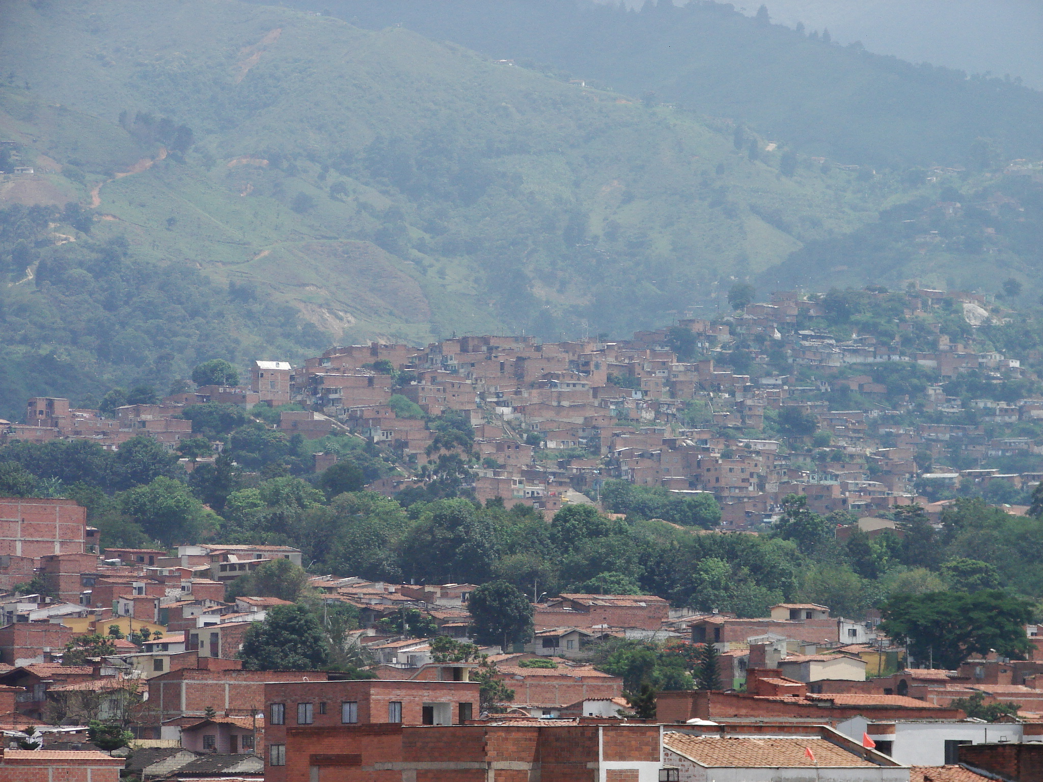 Comuna 13 de Medellin, Colombia.